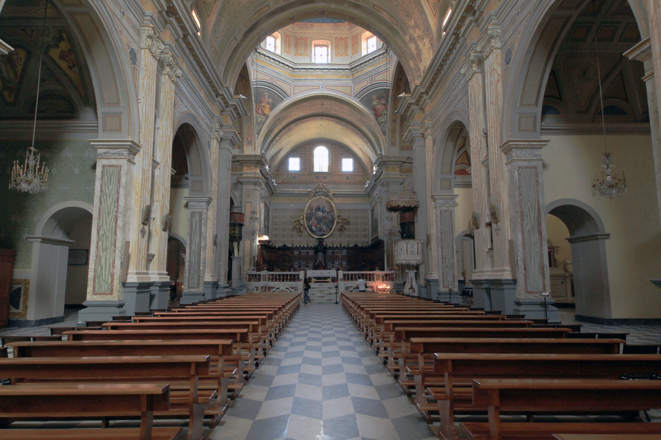 Il Duomo di Santa Maria Assunta